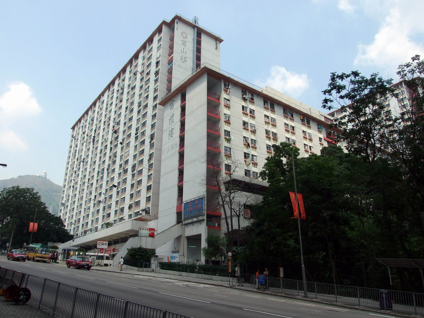 富山邨